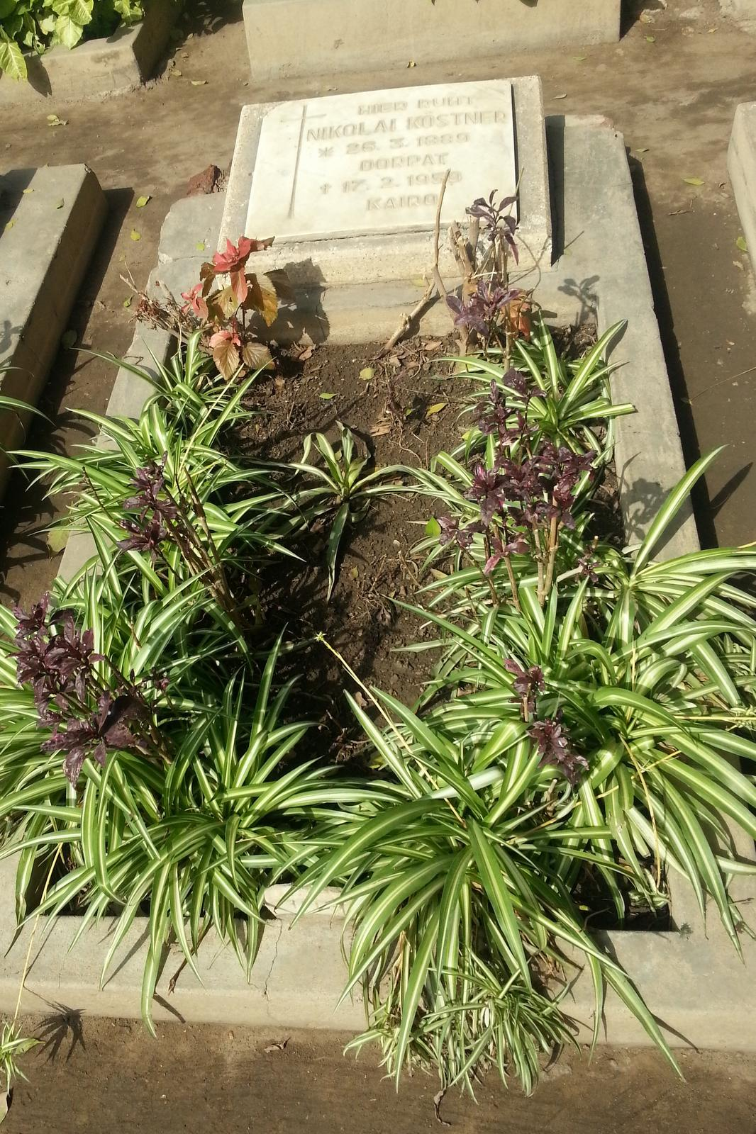 Grabstelle von Nikolai Köstner. Deutscher Friedhof Kairo, Grab Nr. 109